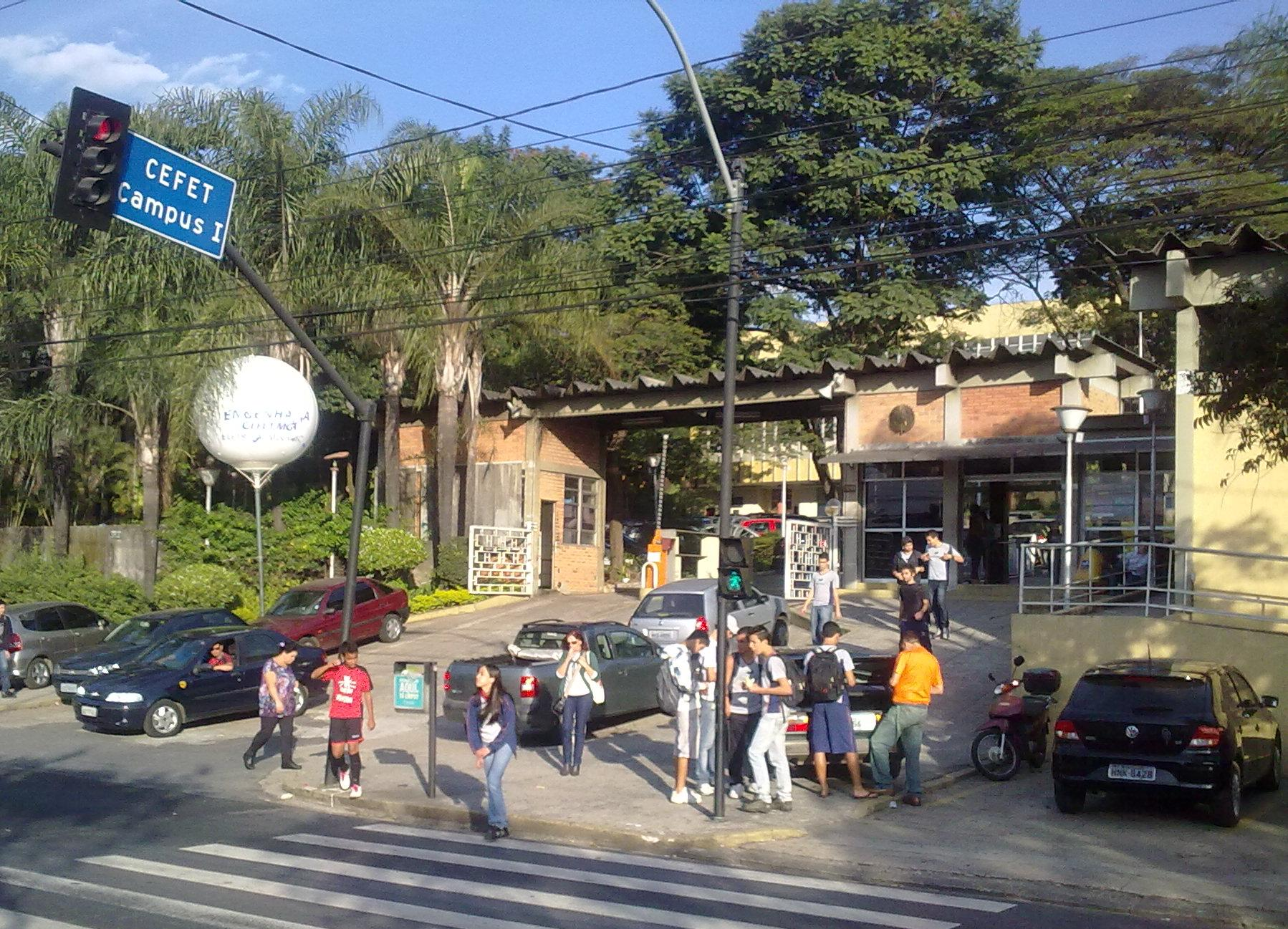 Entrada do campus I do Cefet-MG, em Belo Horizonte, Brasil.